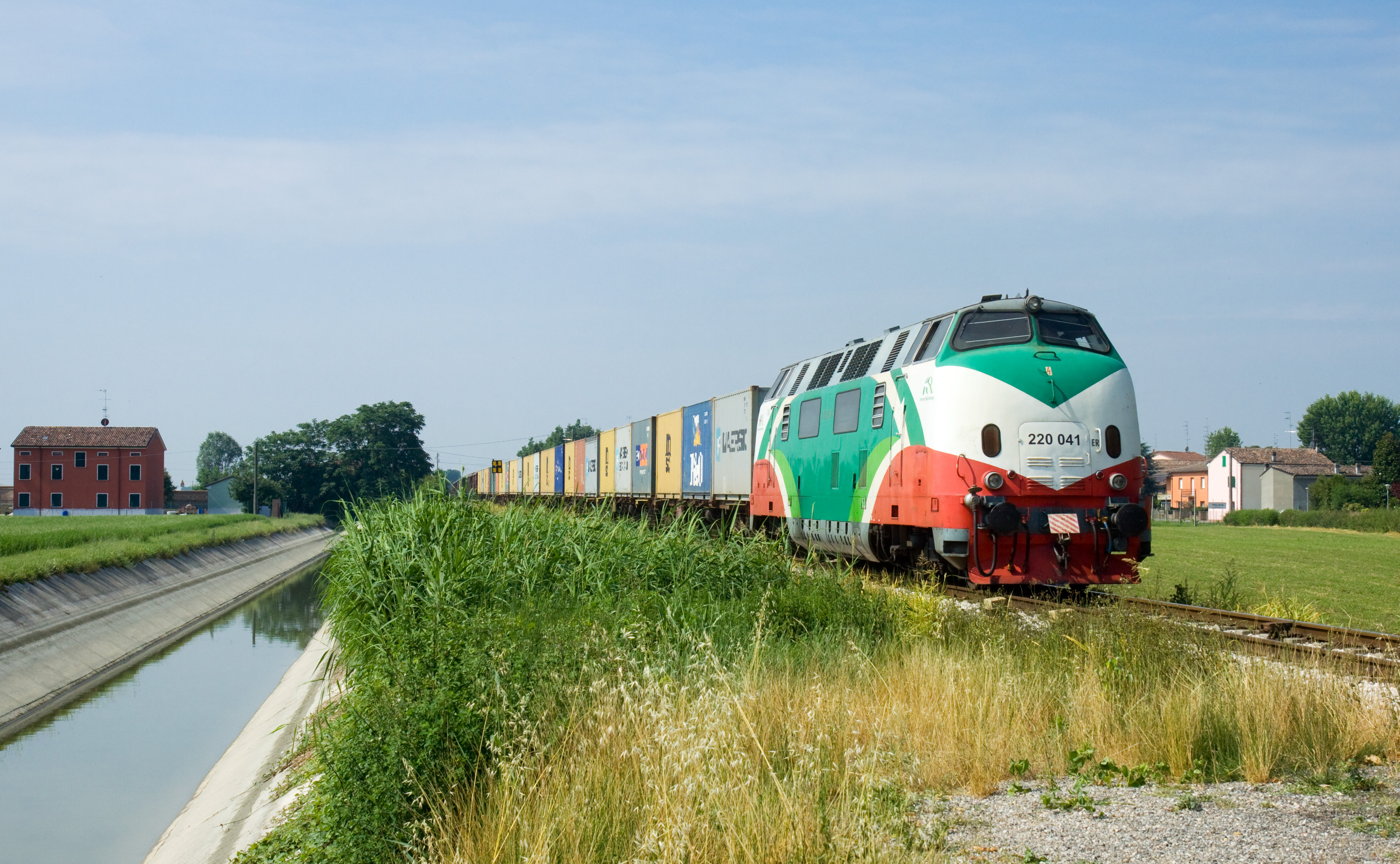 Treno merci delle Ferrovie Emilia Romagna, trainato dalla locomotiva diesel ex tedesca 220.041, proveniente dal parco delle Ferrovie Padane.